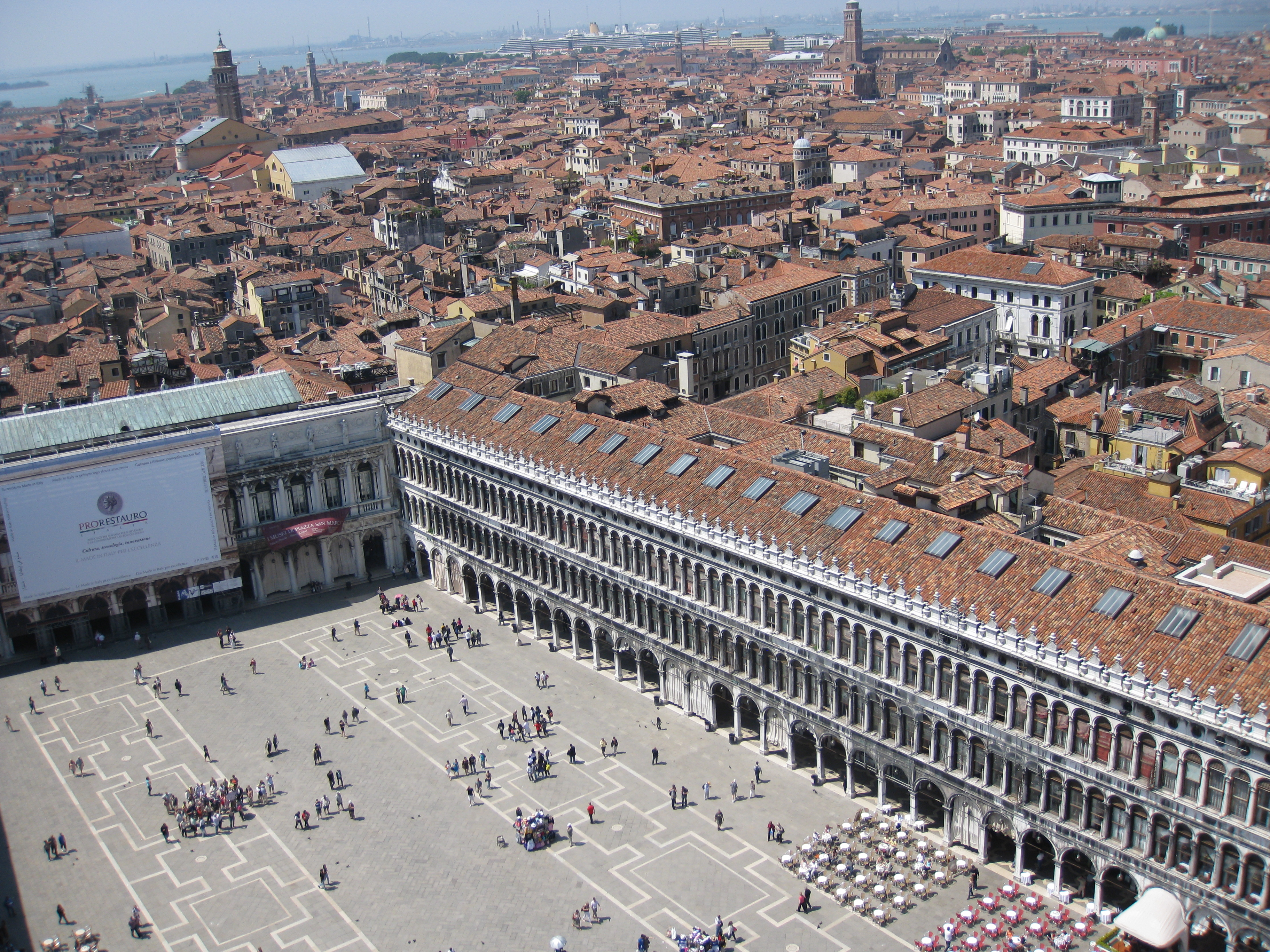 View from the Campanile of St. Marks Basilica הנוף הנשקף ממגדל הפעמונים של כנסיית סנט מרקס